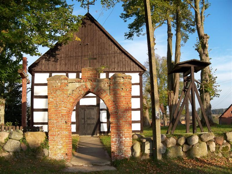 Kościół filialny p.w. św. Szczepana w Starym Dębnie